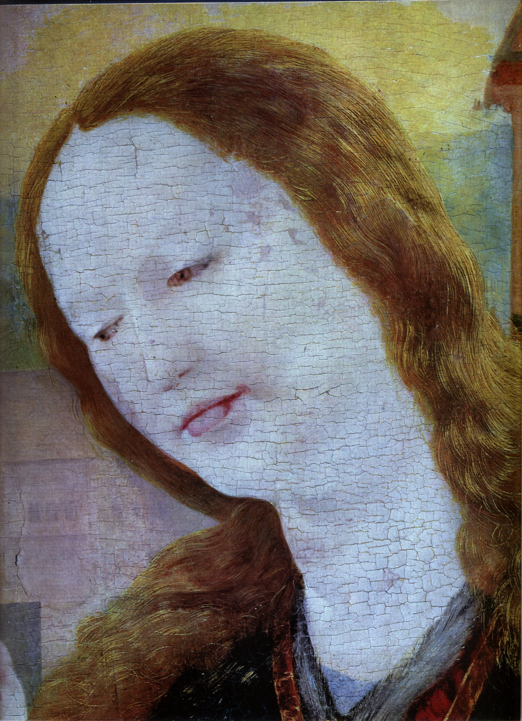 Stuppacher Madonna, Detail: Haupt Mariens